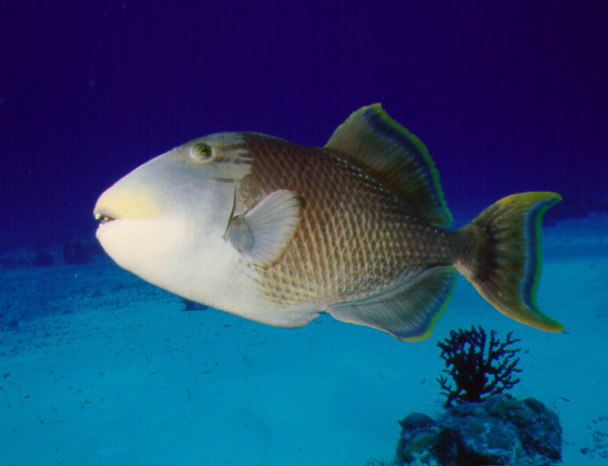 Gelbsaumdrückerfisch im Indischen Ozean (Pseudobalistes flavimarginatus)